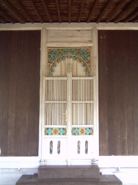 Lawang_Hadapan_Bubungan_Tinggi_Teluk_Selong